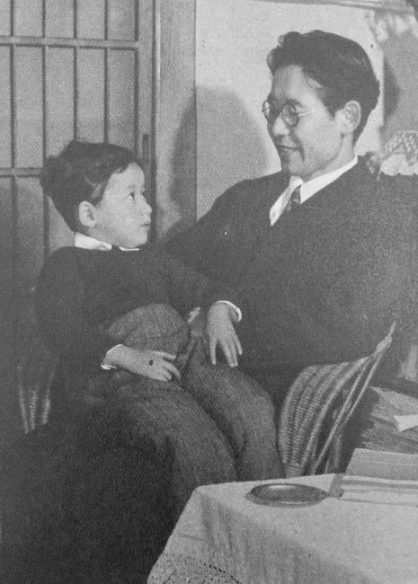 武谷三男とその息子